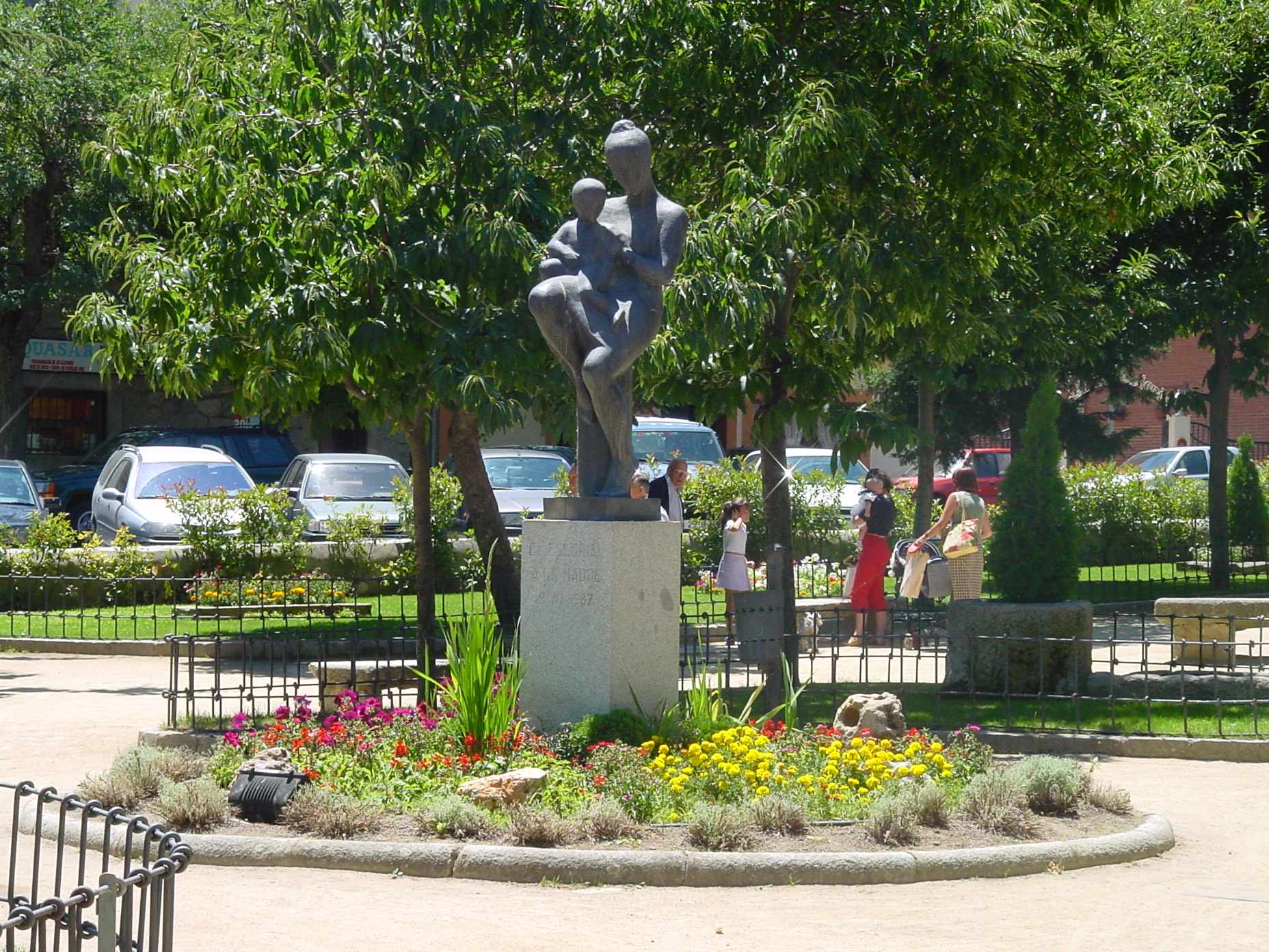 Escultura en El Escorial.